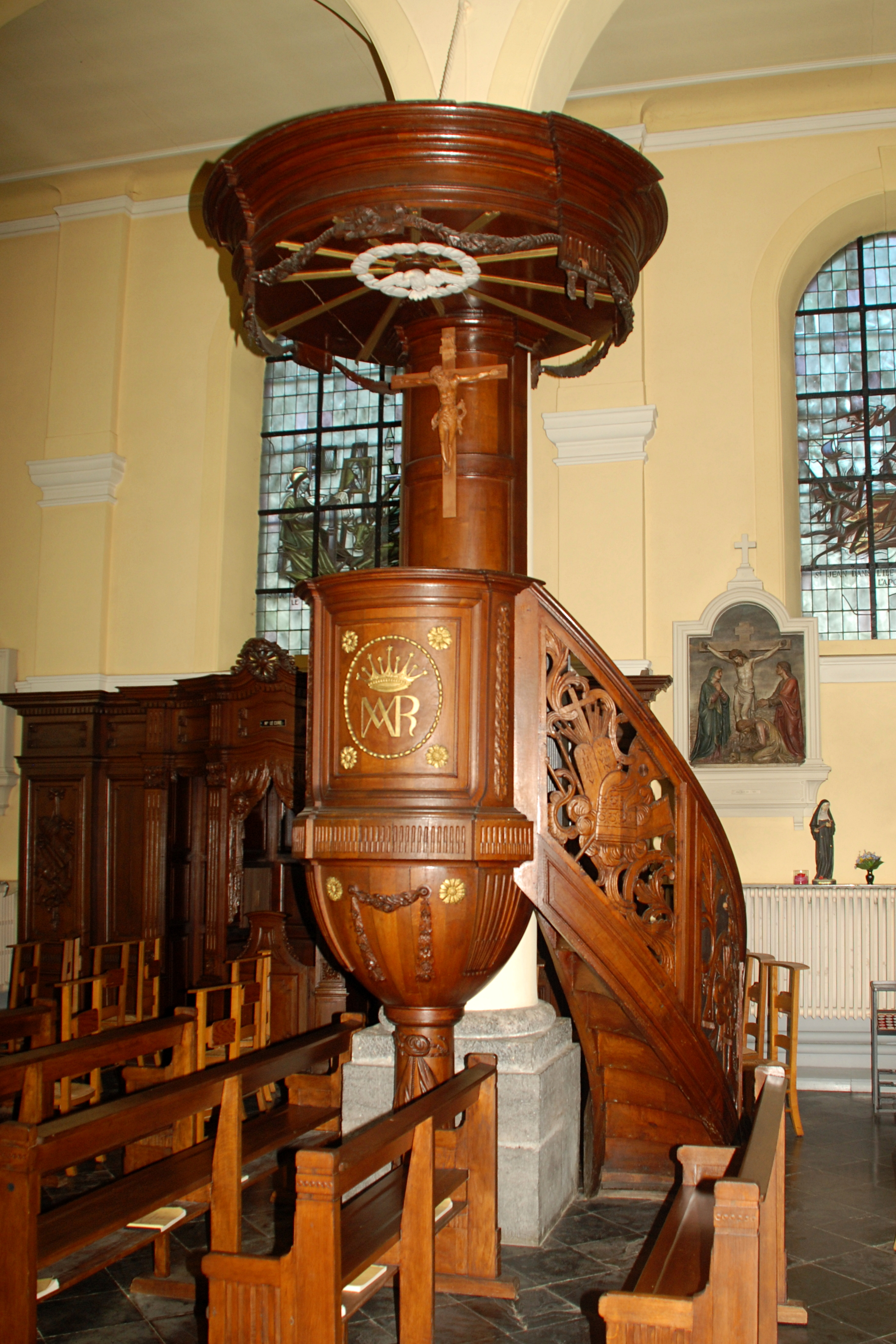 Belgique - Brabant wallon - Mont-Saint-Guibert - Église Saint-Guibert - la chaire de vérité